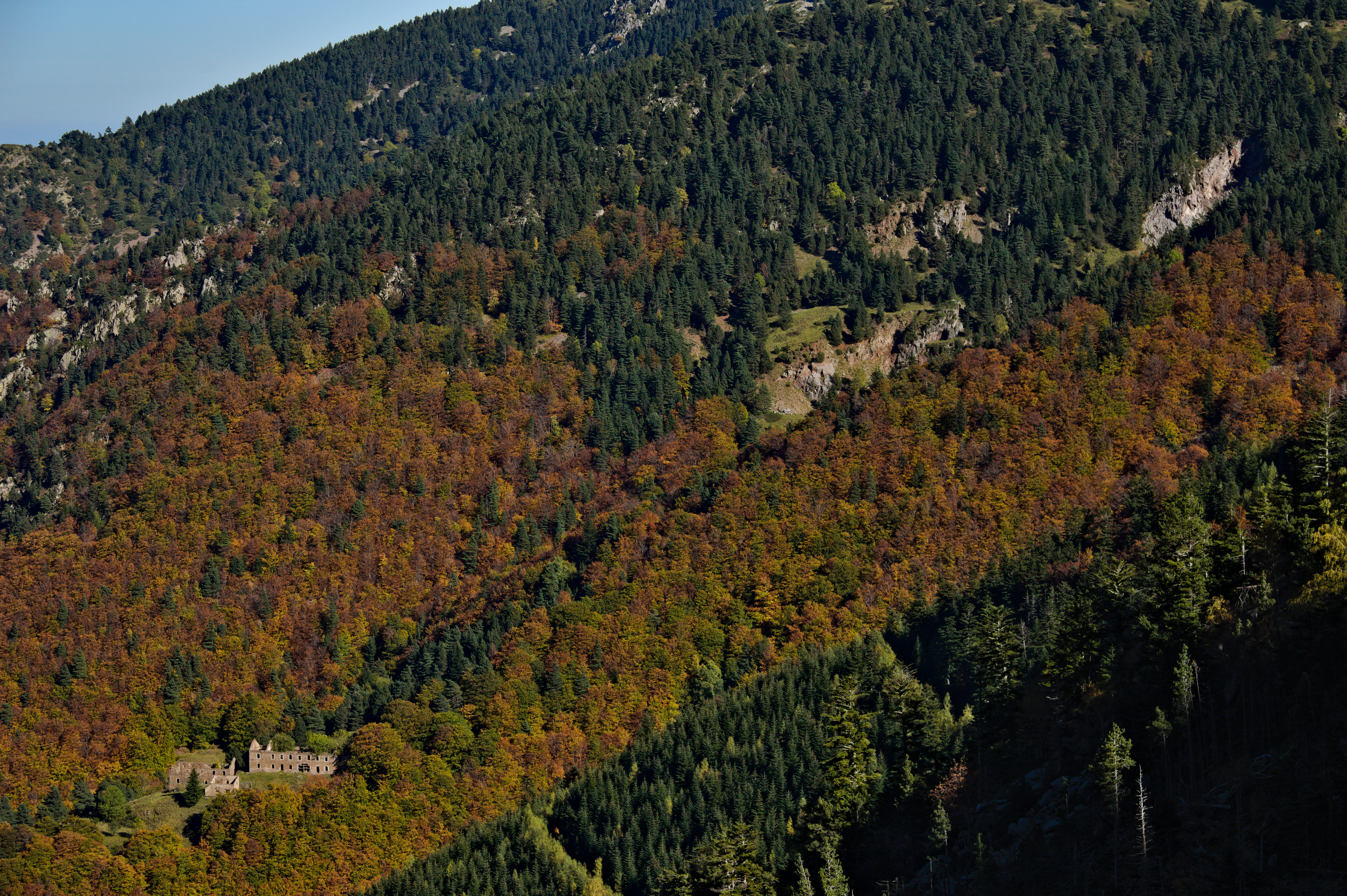 Ancienne mine de fer de la Pinouse (Pyrénées orientales, France). Les ruines de la colonie minière sont visibles en bas à gauche de la photo et sont surplombées par les travaux miniers extérieurs et les entrées de galeries.